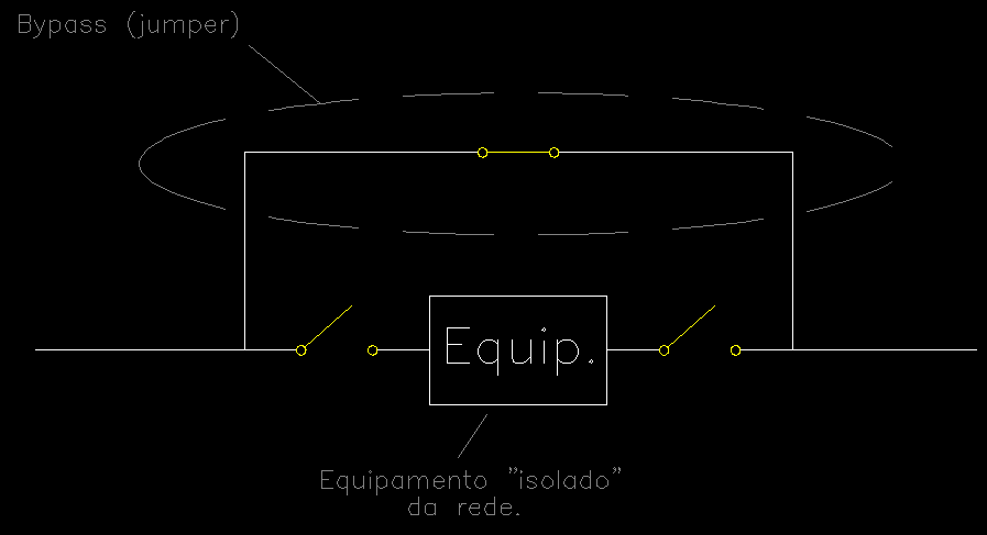 Diagrama representando o processo de "Bypass" (jumper) em redes de distribuição aérea de energia.